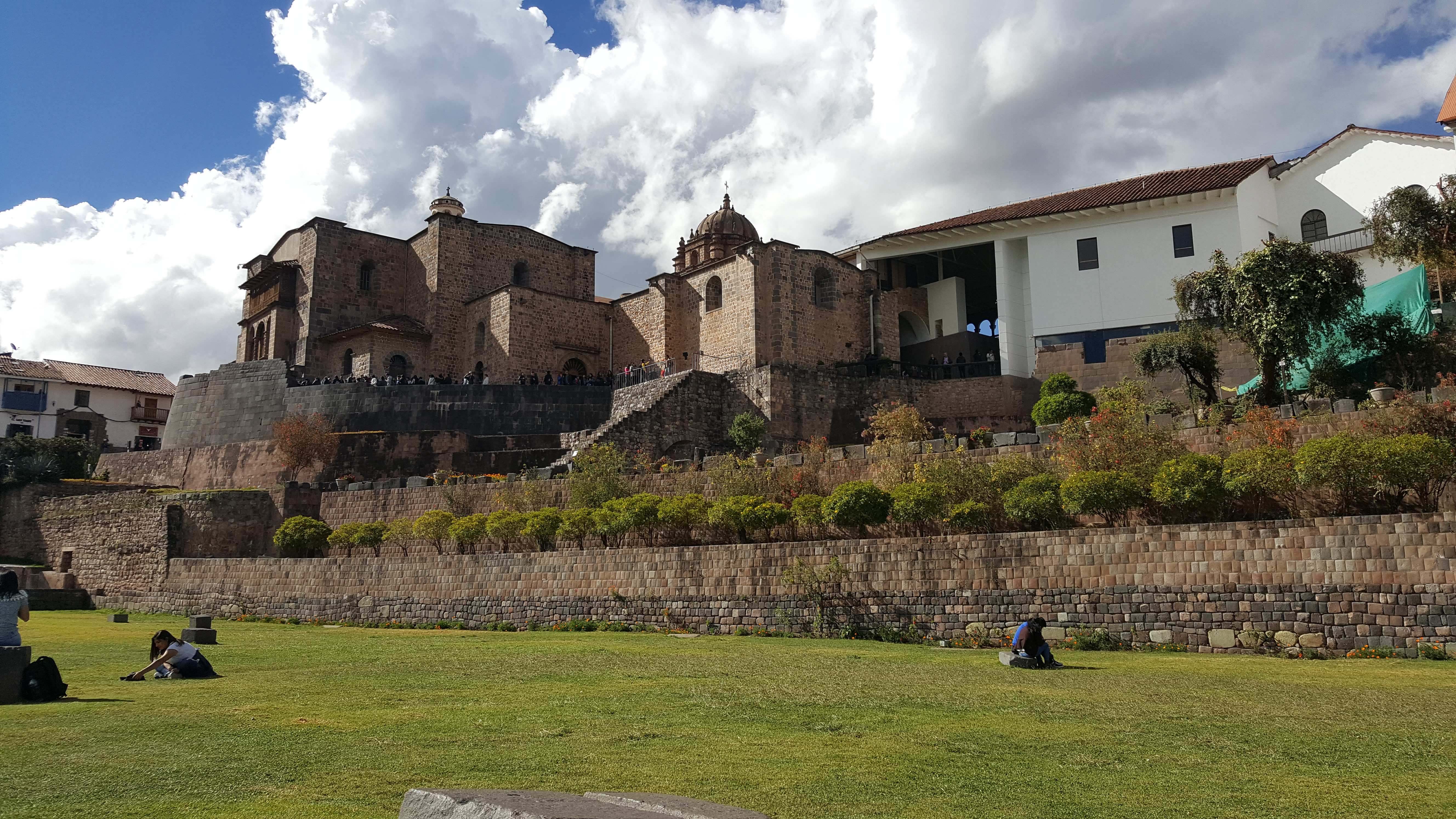 Templo Inca ubicado en el centro histórico de la ciudad del Cuzco